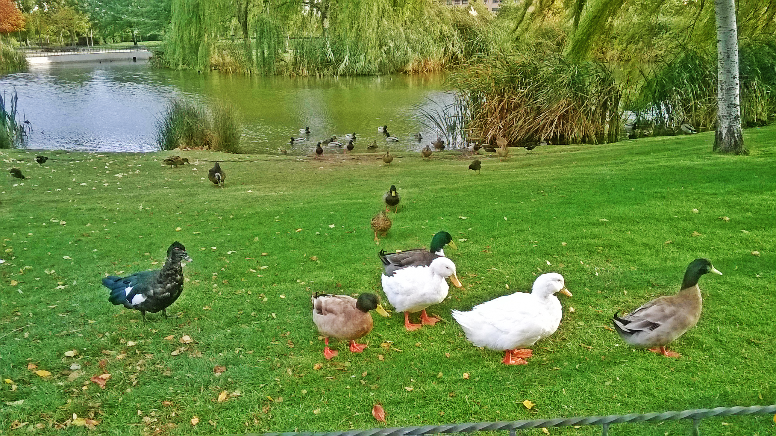 Parla Parque del universo donde en sus dos estanques se encuentran diferentes especies de patos y otras aves acuáticas